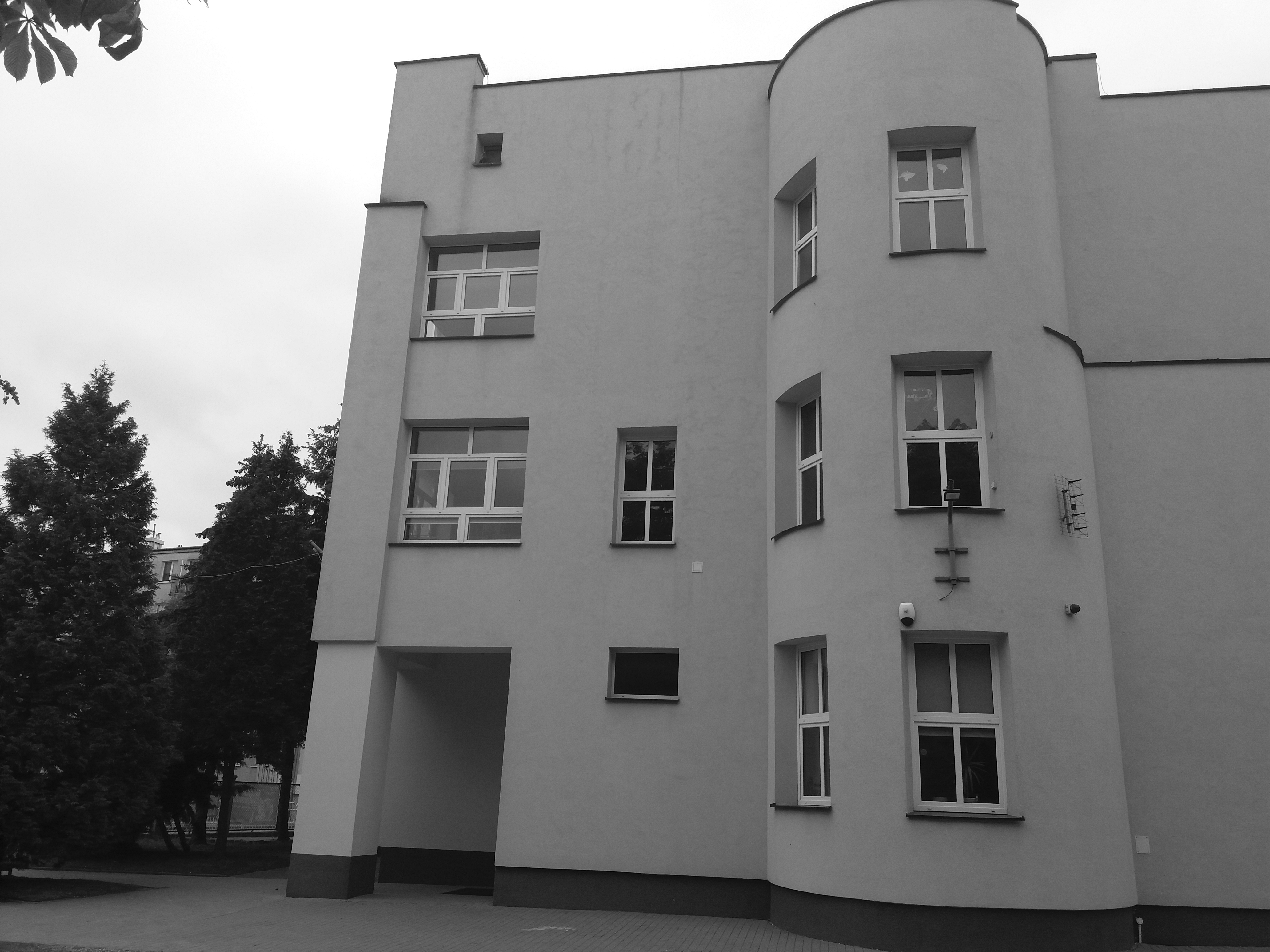 Szkola podstawowa nr 1 Blonie klatka schodowa